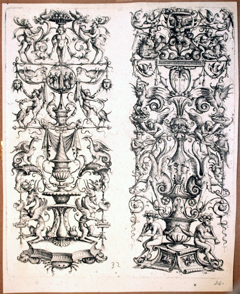 Hopfer, Daniel (ca 1470-1536): Pair of ornamental fillets with grotesques. Zwei Ornamentleisten ("Tafelaufsätzen") mit Grotesken. Radierung auf Bütten. 27,8 x 23,5 cm. In der Platte monogrammiert und mit der Funck-Nummer "32". Hollstein 110 II; Bartsch 99. - Noch ausgezeichneter Druck mit Plattenschmutz, umlaufender kleiner Rand.